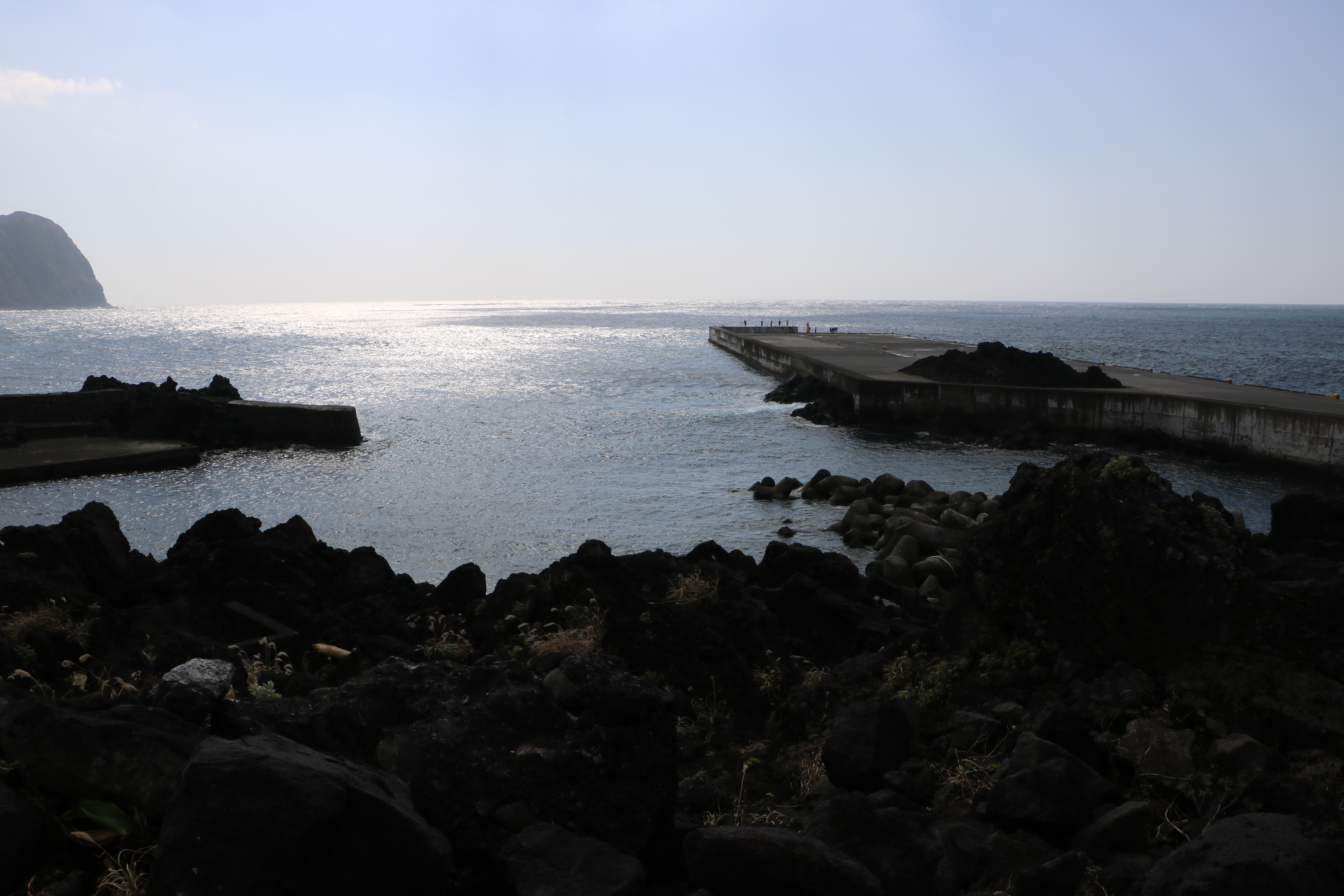 八重根港（東京都八丈町）